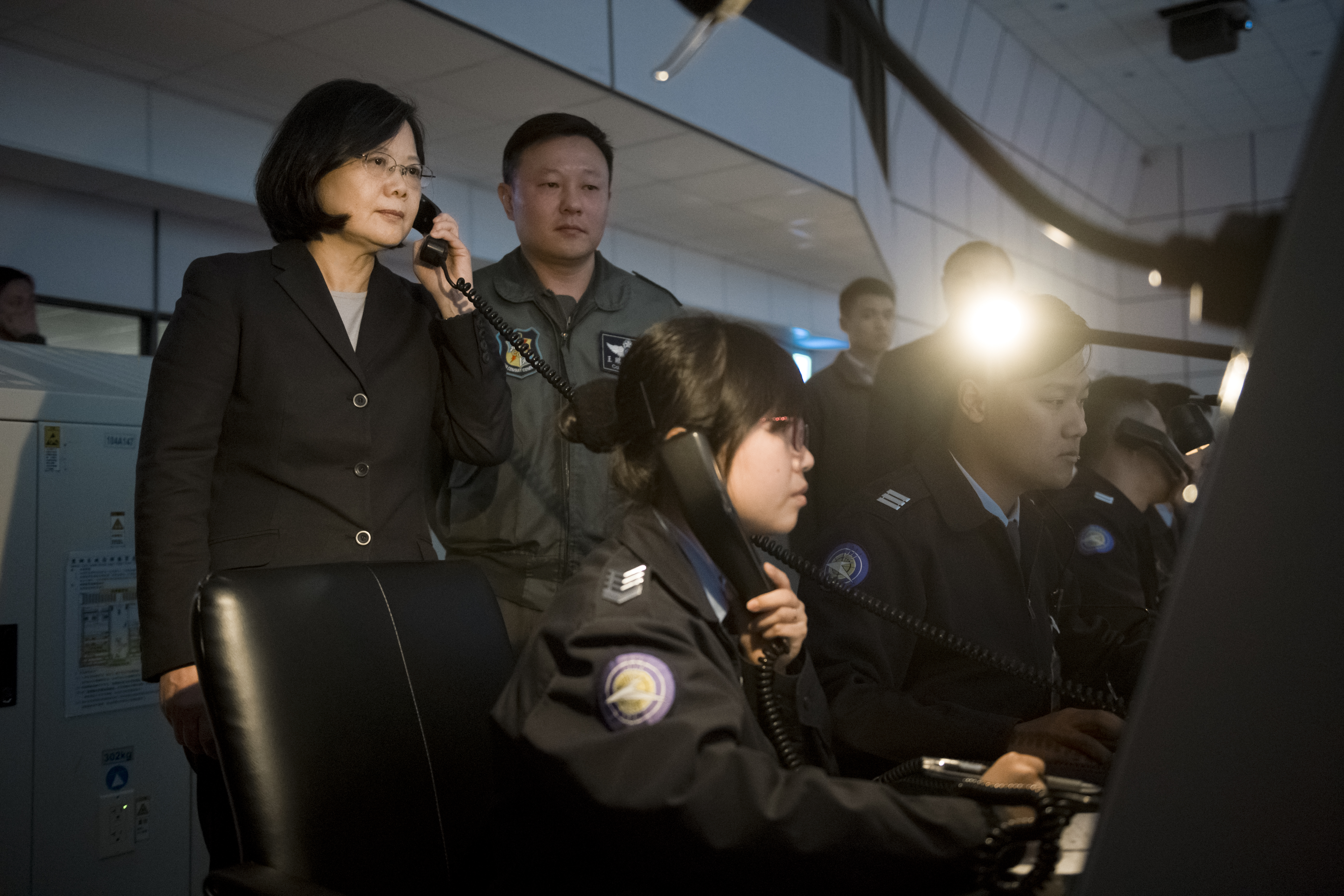 12.23 視導空軍作戰指揮部，聽取任務簡報，並實地瞭解我國防空任務戰備情形。